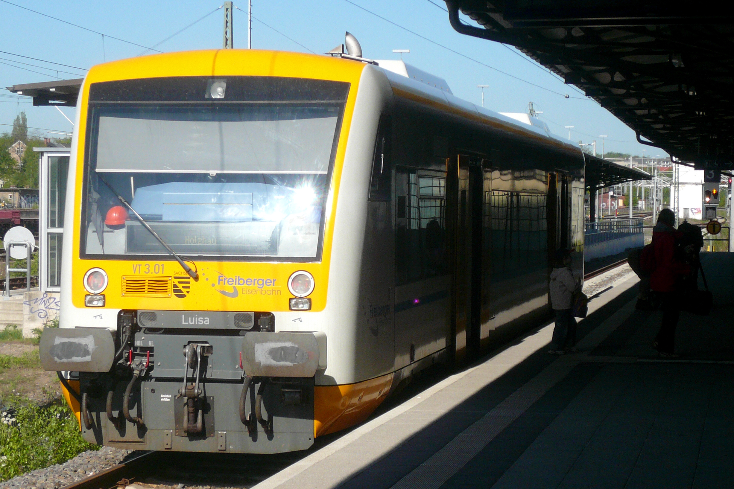 Stadler Regio-Shuttle RS1 der Freiberger Eisenbahn in Freiberg (Sachsen)